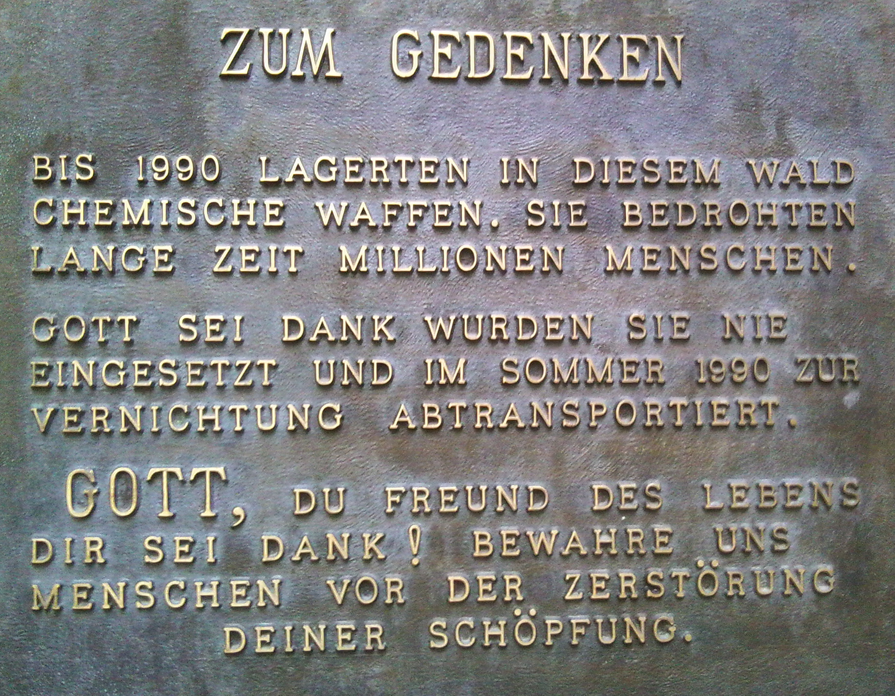 Clausen, ehem. US-Depot, Gedenktafel Aktion Lindwurm